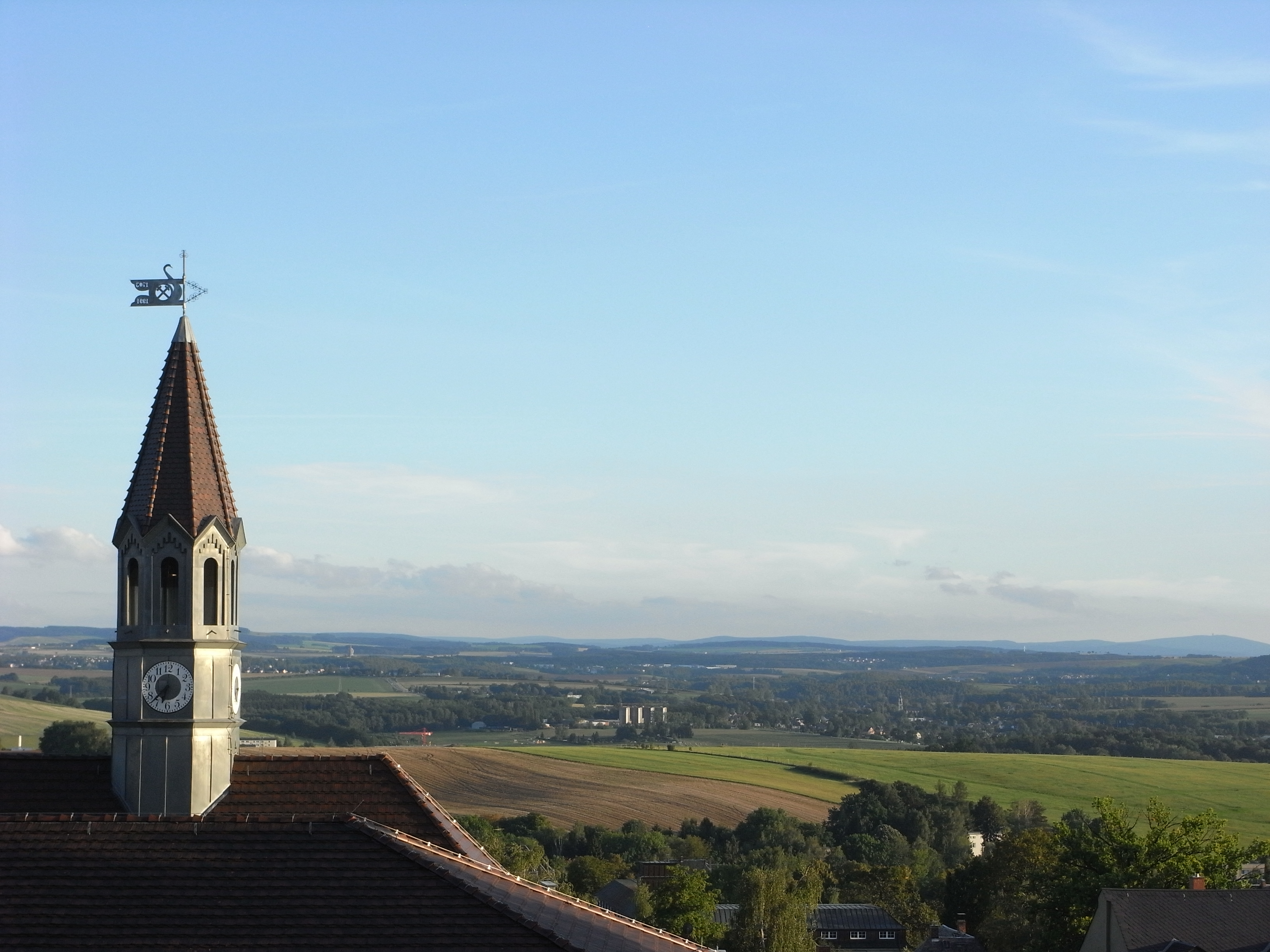 Hohenstein-Ernstthal, Rathaus, Altmarkt 41, an Stelle des einstigen Brauhauses 1702/03 errichtet, 1905 im historischen Stil umgebaut.